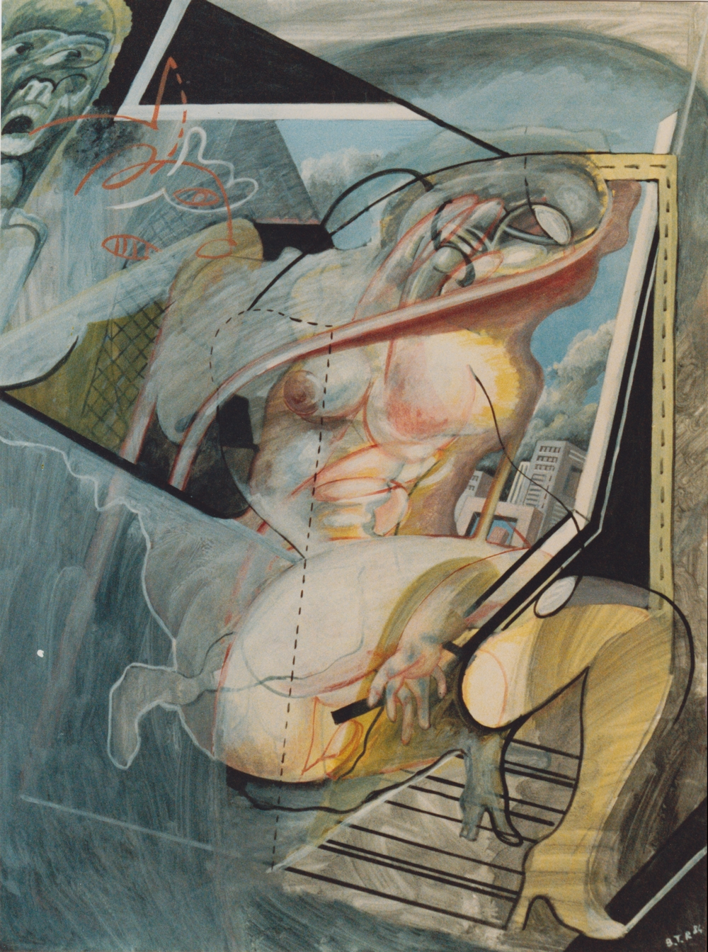 Tableau: Lourd après-midi d'orage